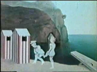 Emile Reynaud - 1895 - Autour d'une Cabine 0010